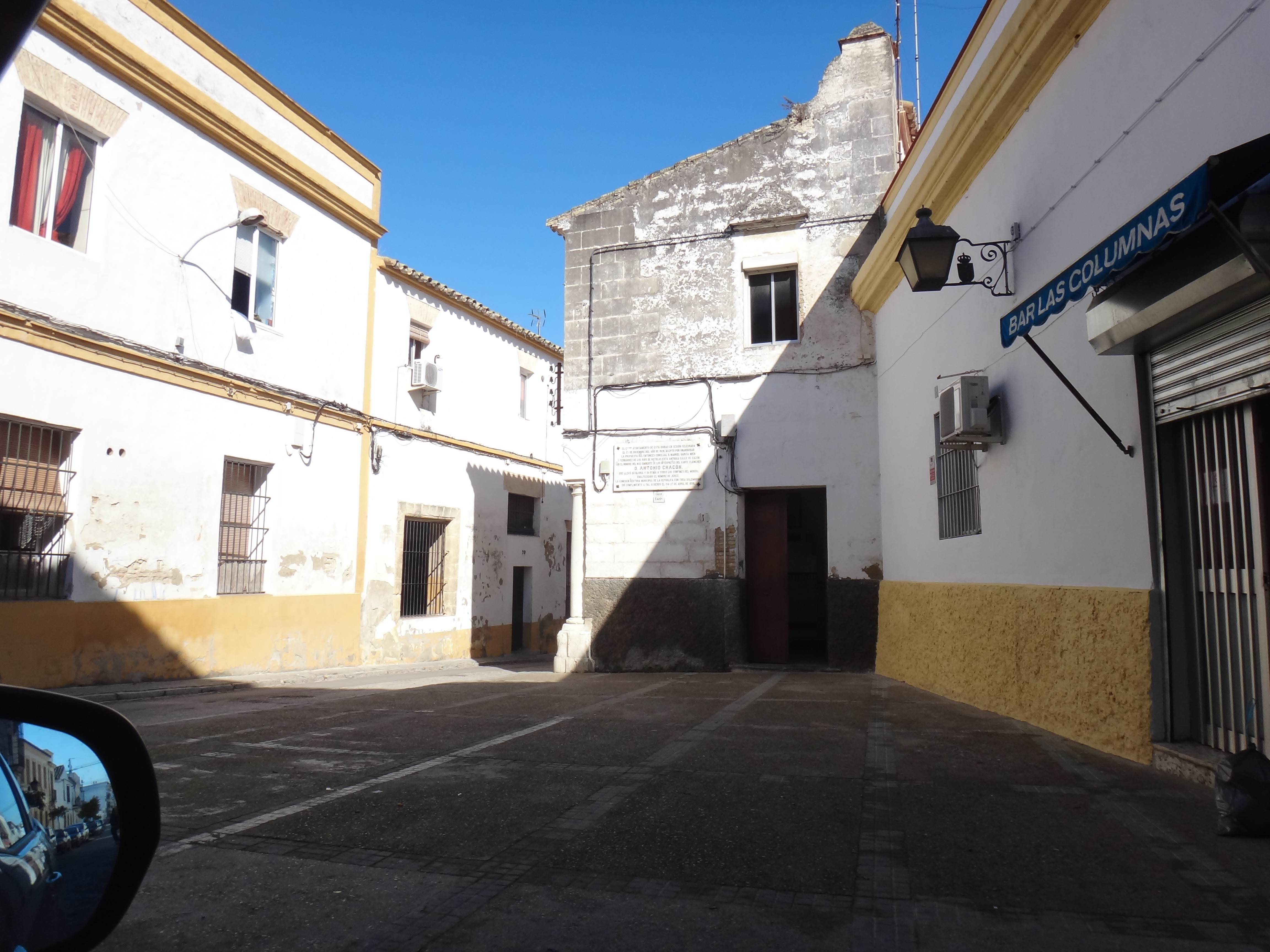 Placa Homenaje a Don Antonio Chacón en Jerez de la Frontera (Andalucía, España)